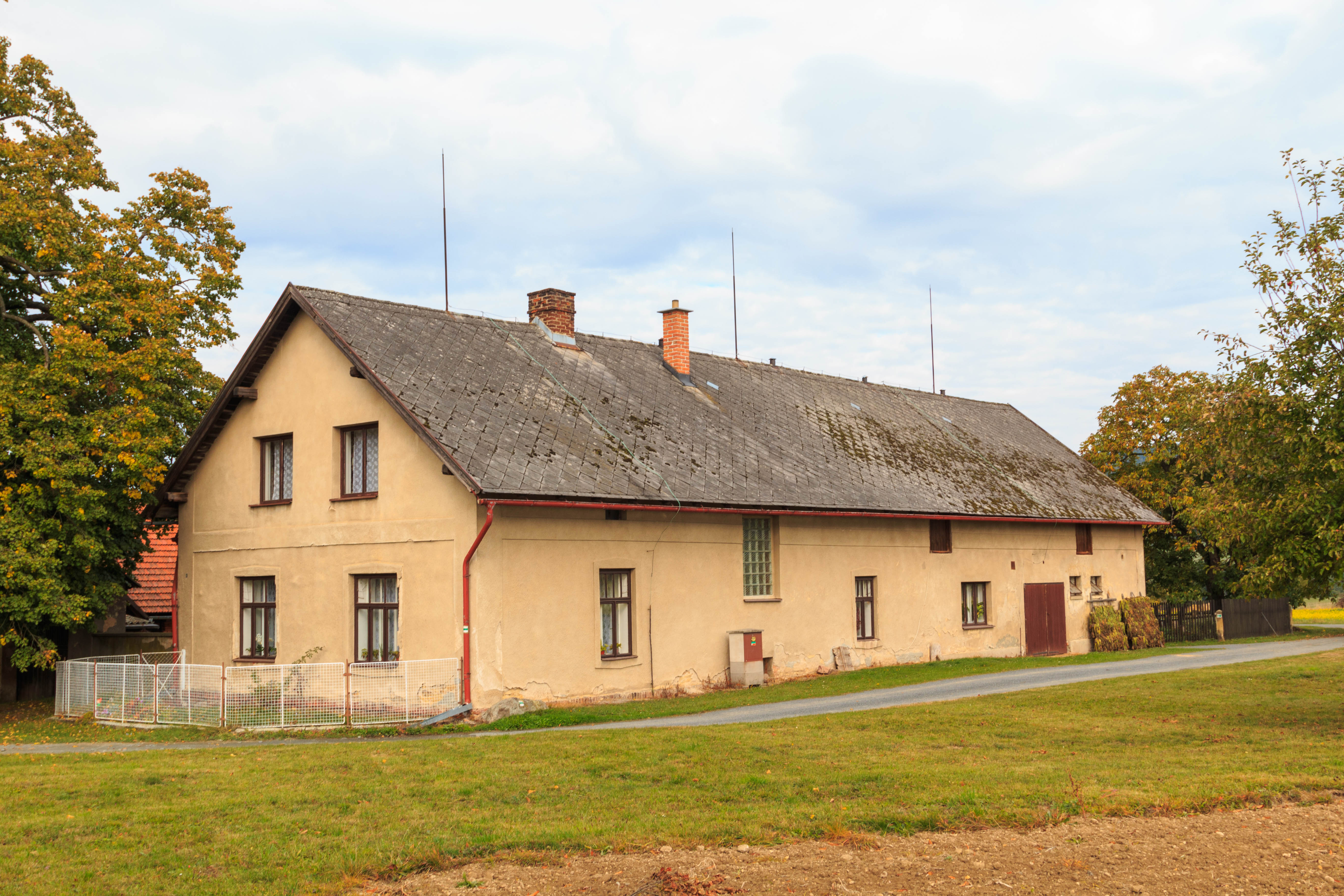 Lány čp. 3